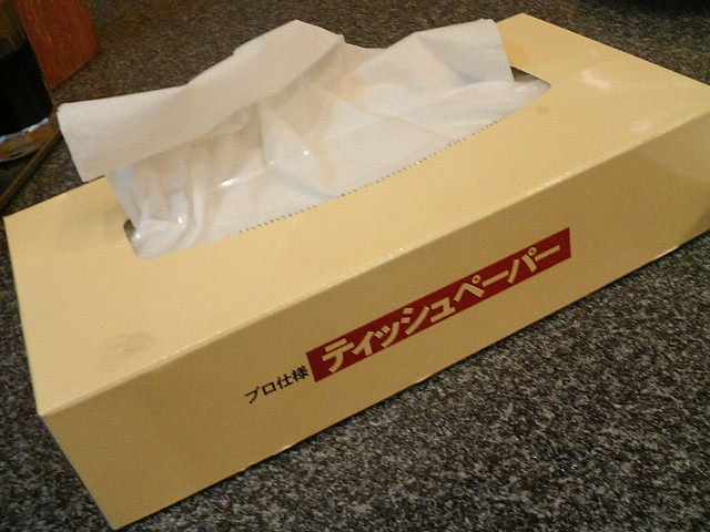 ハナマサ製でした。ギョーザ屋でみつけました。box tissue